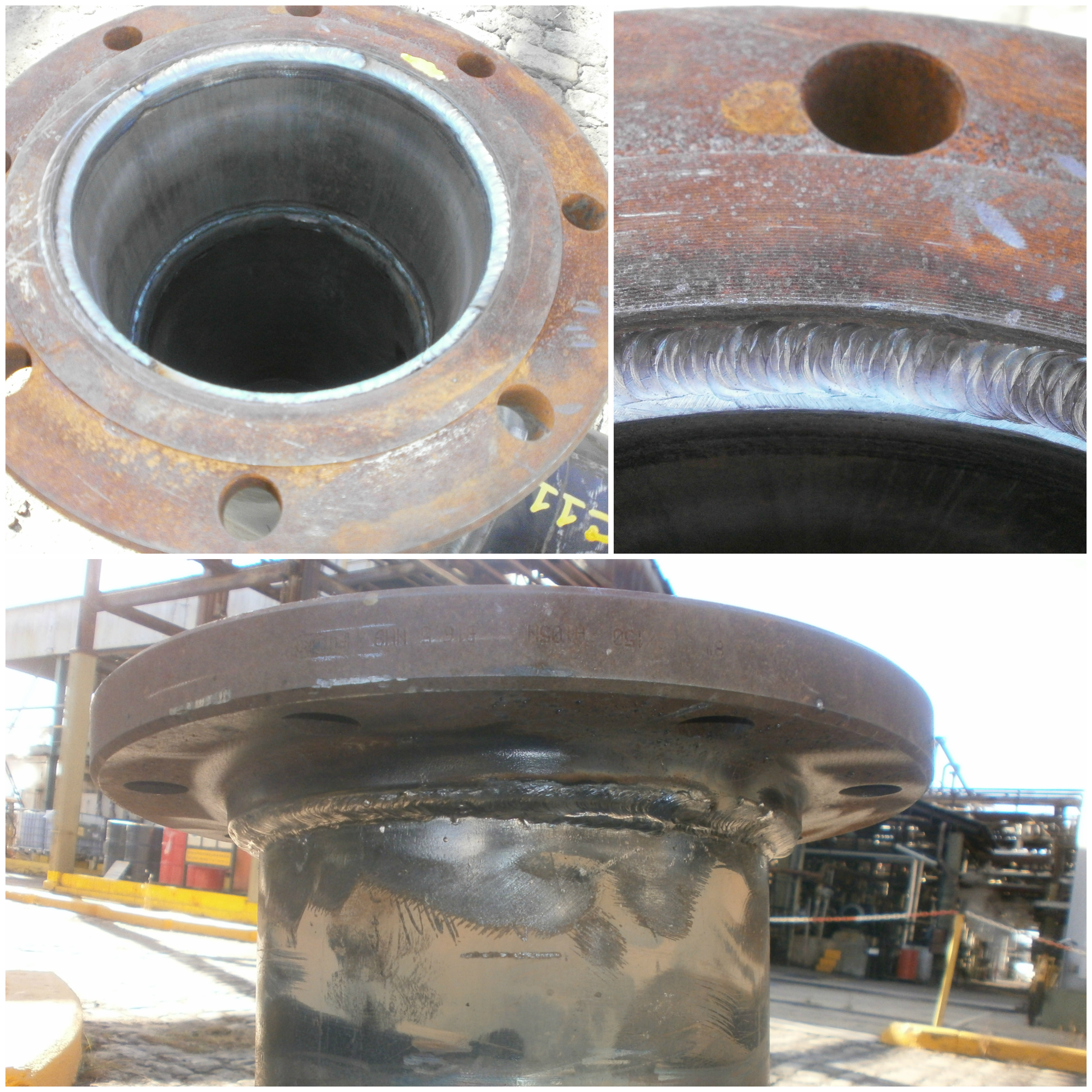 Brida de cuello deslizable de 6" serie 150 soldada a cañería. Se puede ver la soldadura a filete entre el cuerpo de la brida y la superficie exterior de la cañería y la otra soldadura entre el interior de la brida y la cañería.